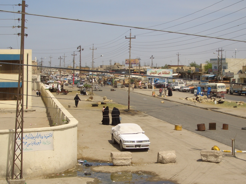 سوق خمسه ميل في محافظة البصرة بجنوب العراق من مركز شرطة الهادي الواقع في وسط المنطقة